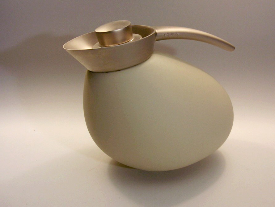 Georg Jensen, Thermoskanna